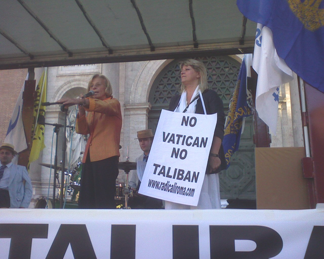 Emma Bonino e Rita Bernardini durante la manifestazione No Vatican, No Taliban a Roma